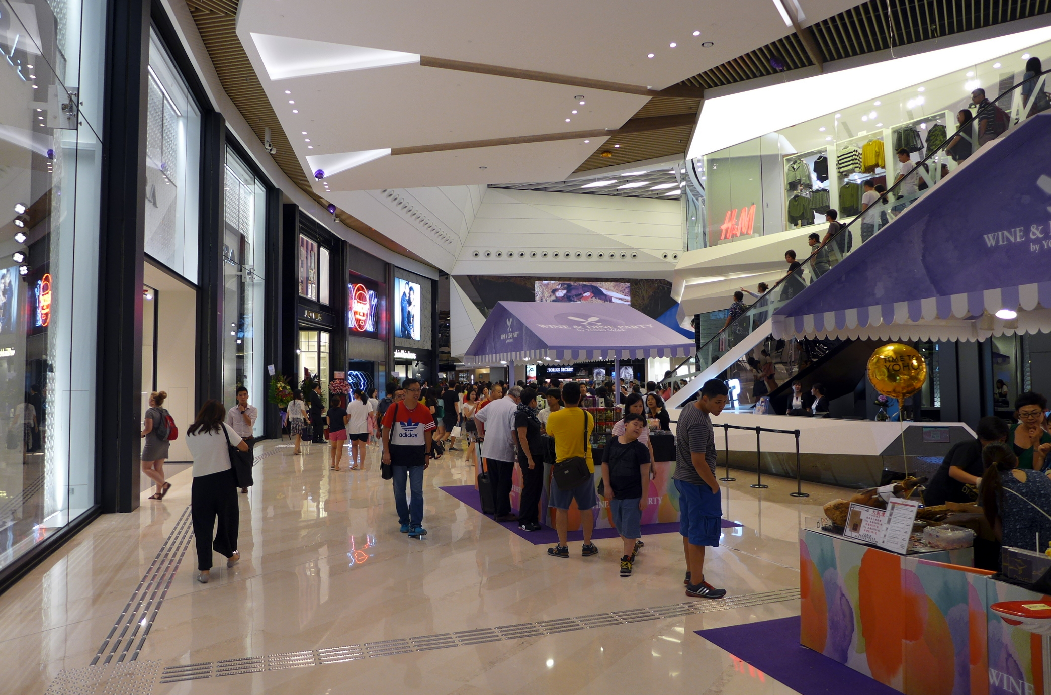 YOHO MALLI Atrium